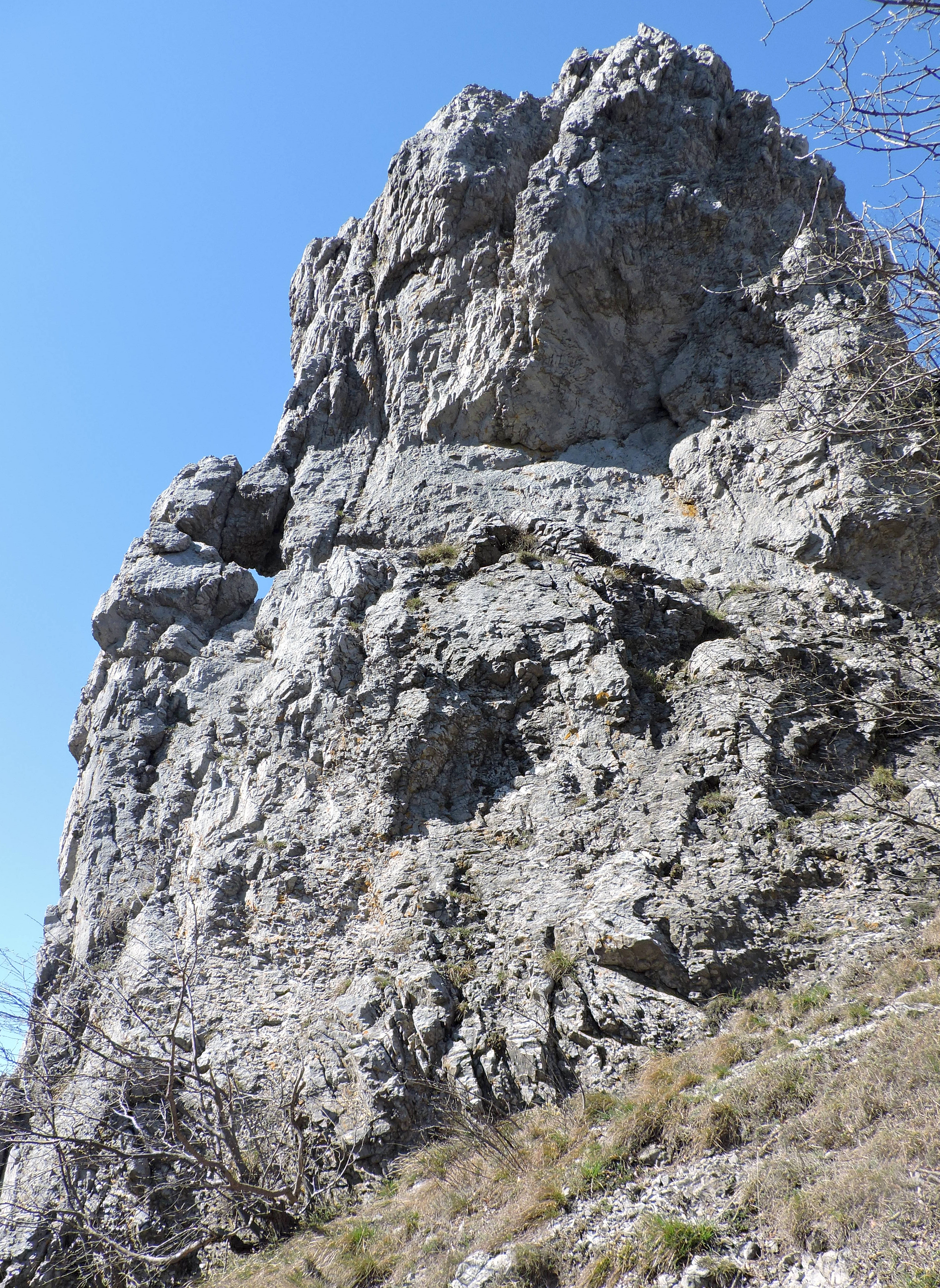 Monte Ravinet - Rocca Barbena (Q49961672)